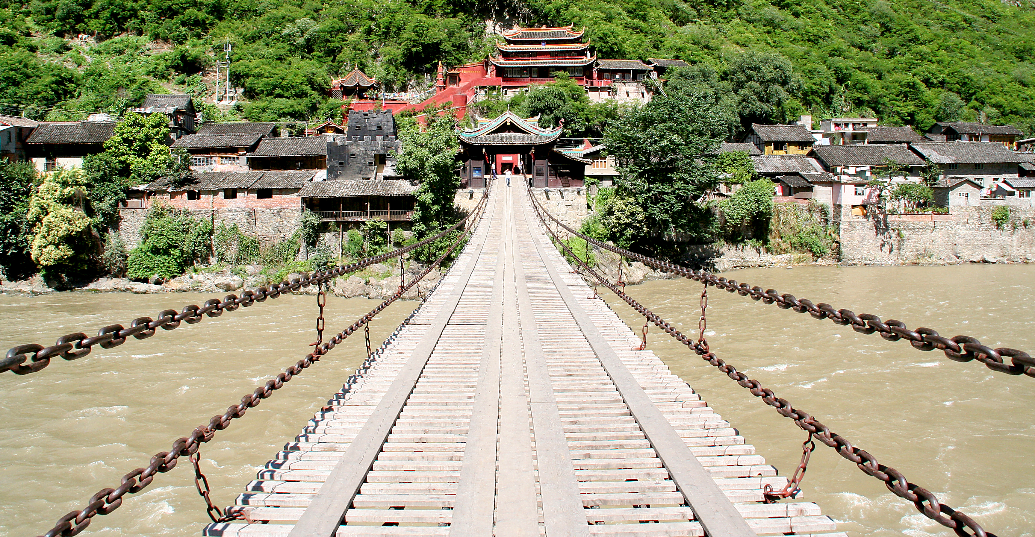 June 07 350D 127